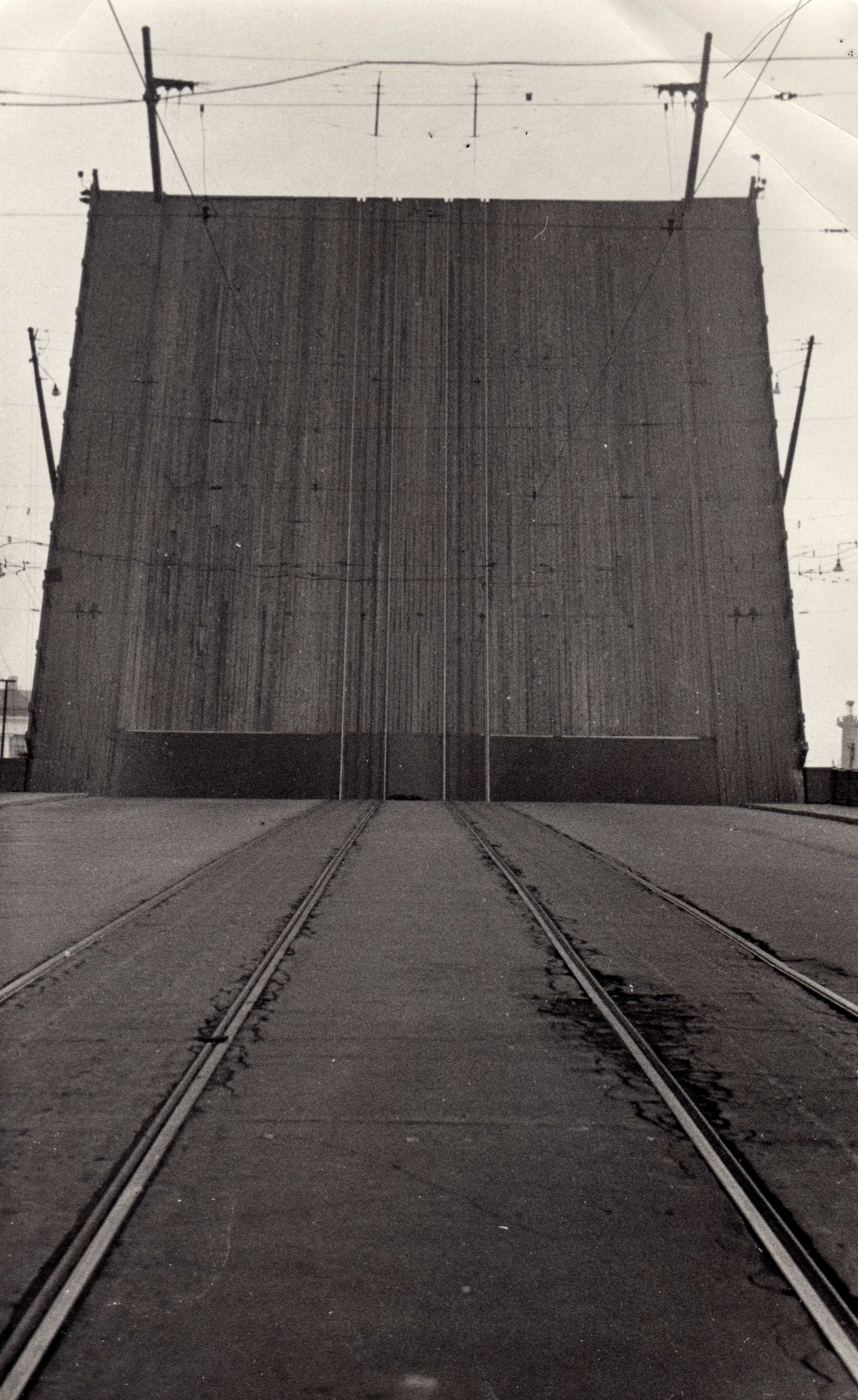 Развод Дворцового моста. Трамвайные пути (1970-е)